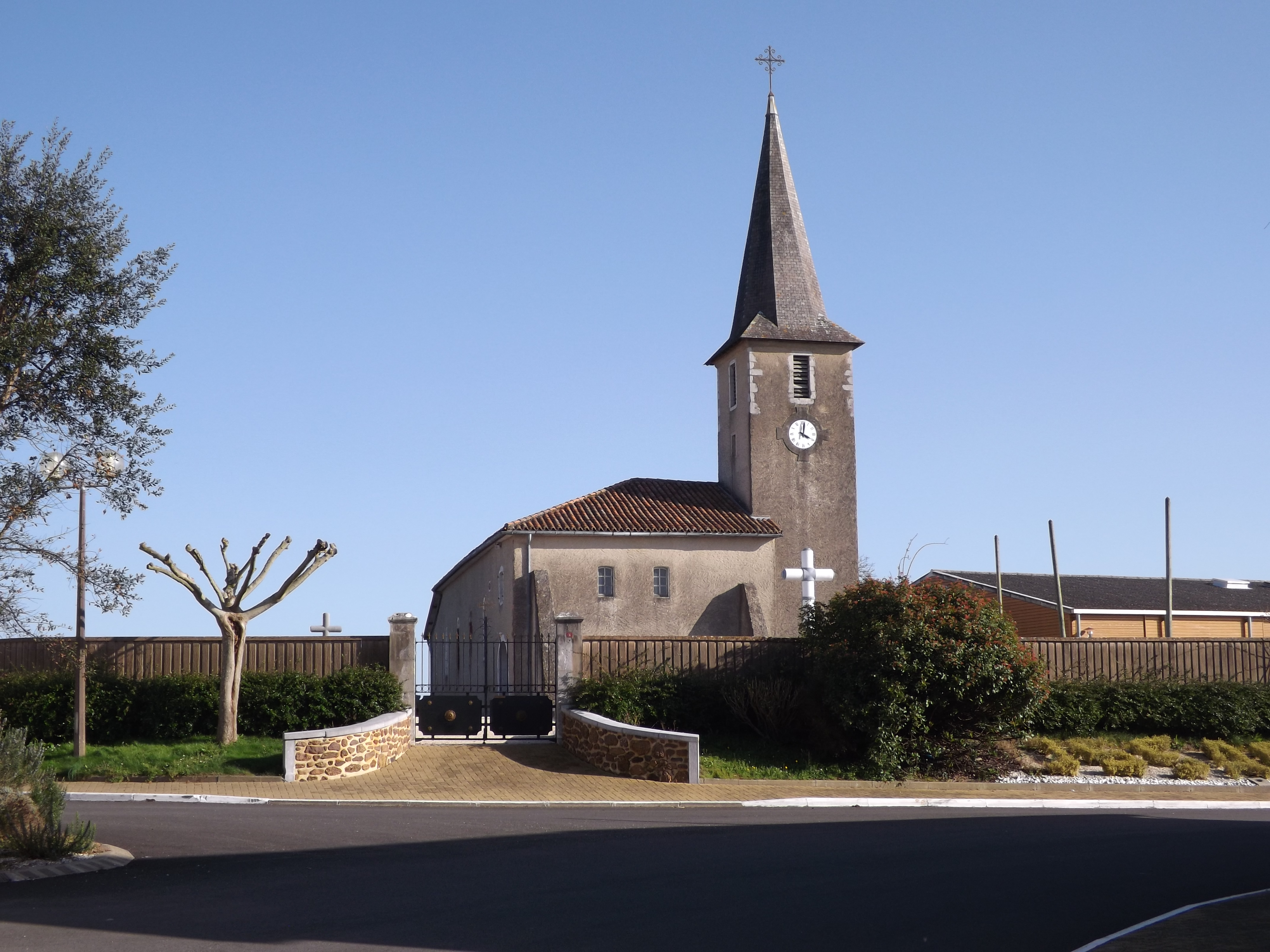 Glèisa d'Ossadjas, Shalòssa, Gasconha